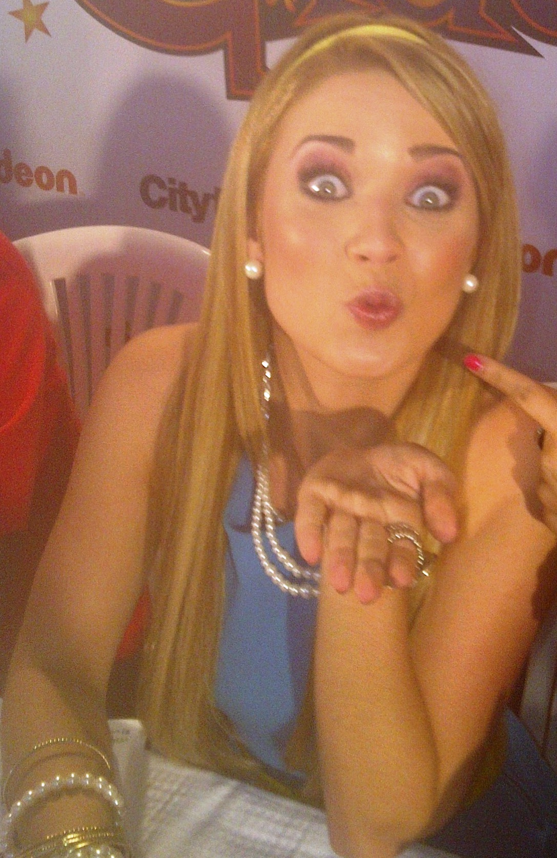 Versión acortada y editada de la versión original por Juanpbc.